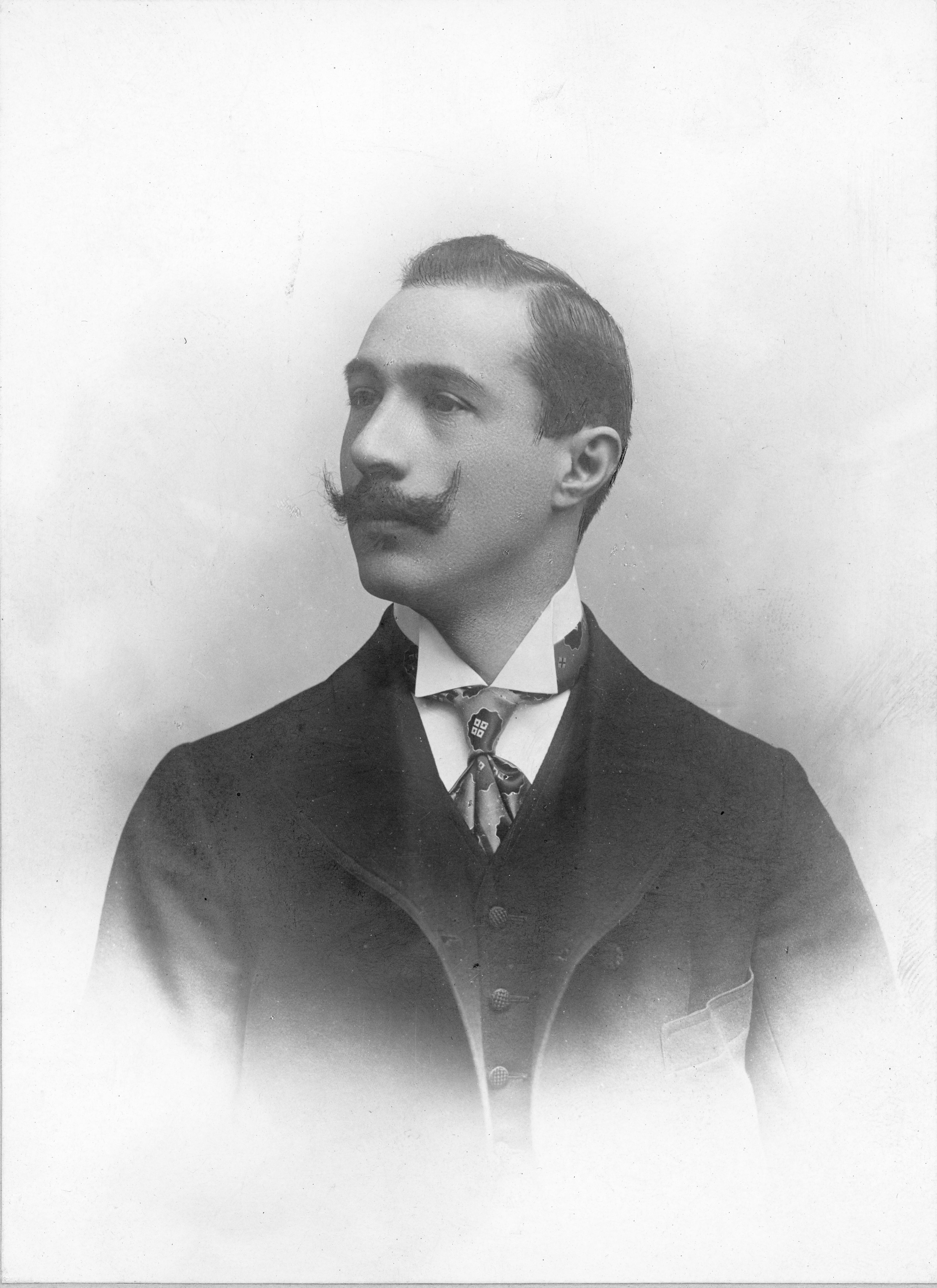 Oreste Franzi, Milano